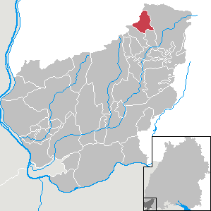 Wieden, Landkreis Lörrach, Baden-Württemberg